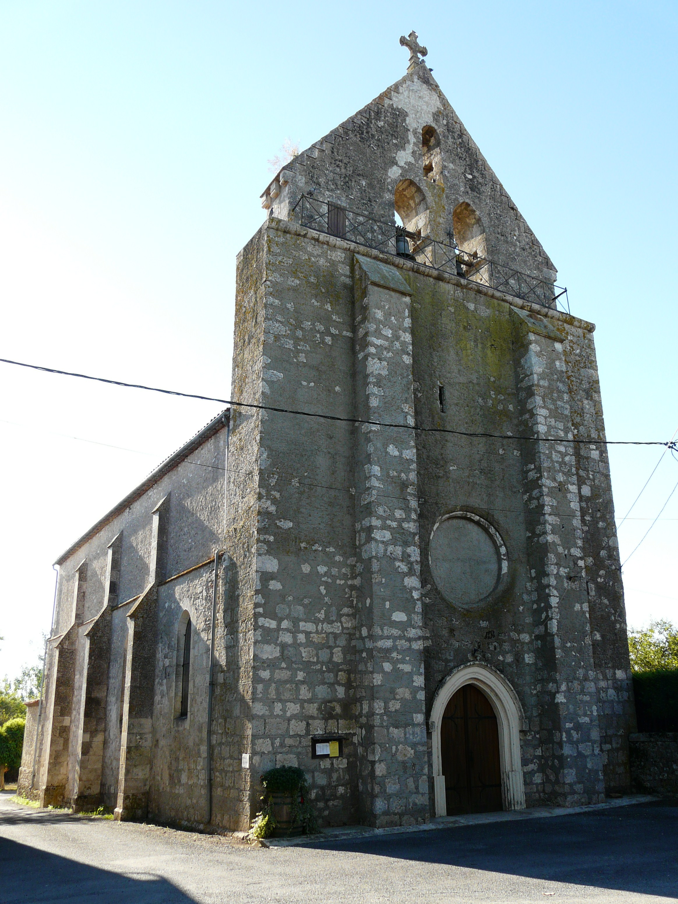 La façade occidentale de l'église Saint-Jean-Baptiste, Fonroque, Dordogne, France.